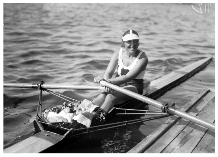 Kamilla Plewake, zawodniczka kluby Śmigły Wilno po zdobyciu Mistrzostwa Polski w wioślarstwie w roku 1933 (jedynki kobiet). Na piersi widać emblemat dotychczasowego klubu zawodniczki, KS 3 Baonu Saperów Wileńskich.